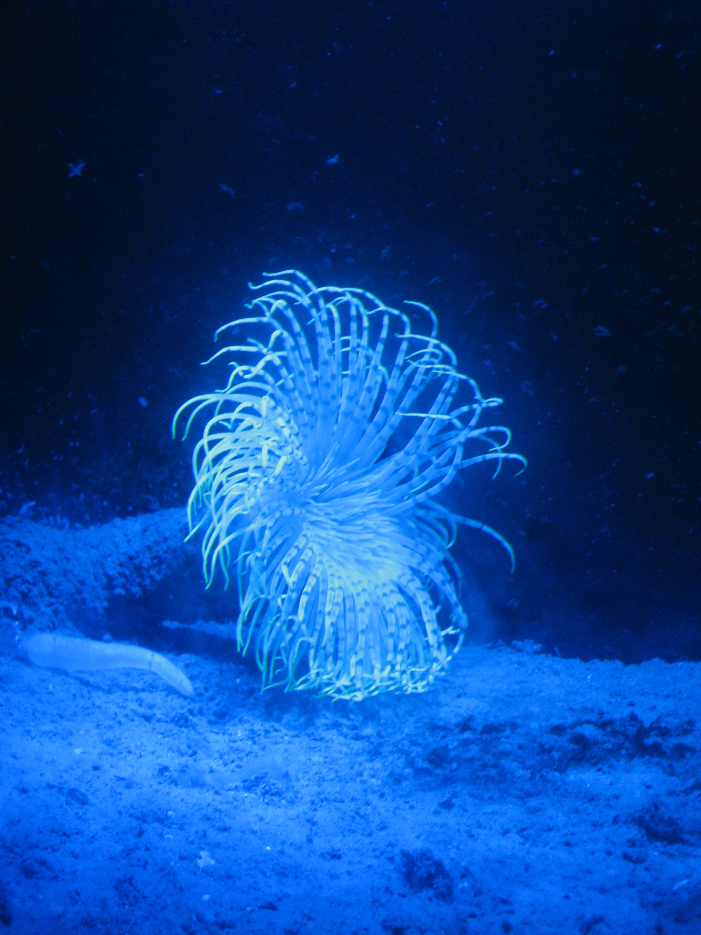 Cylinderros